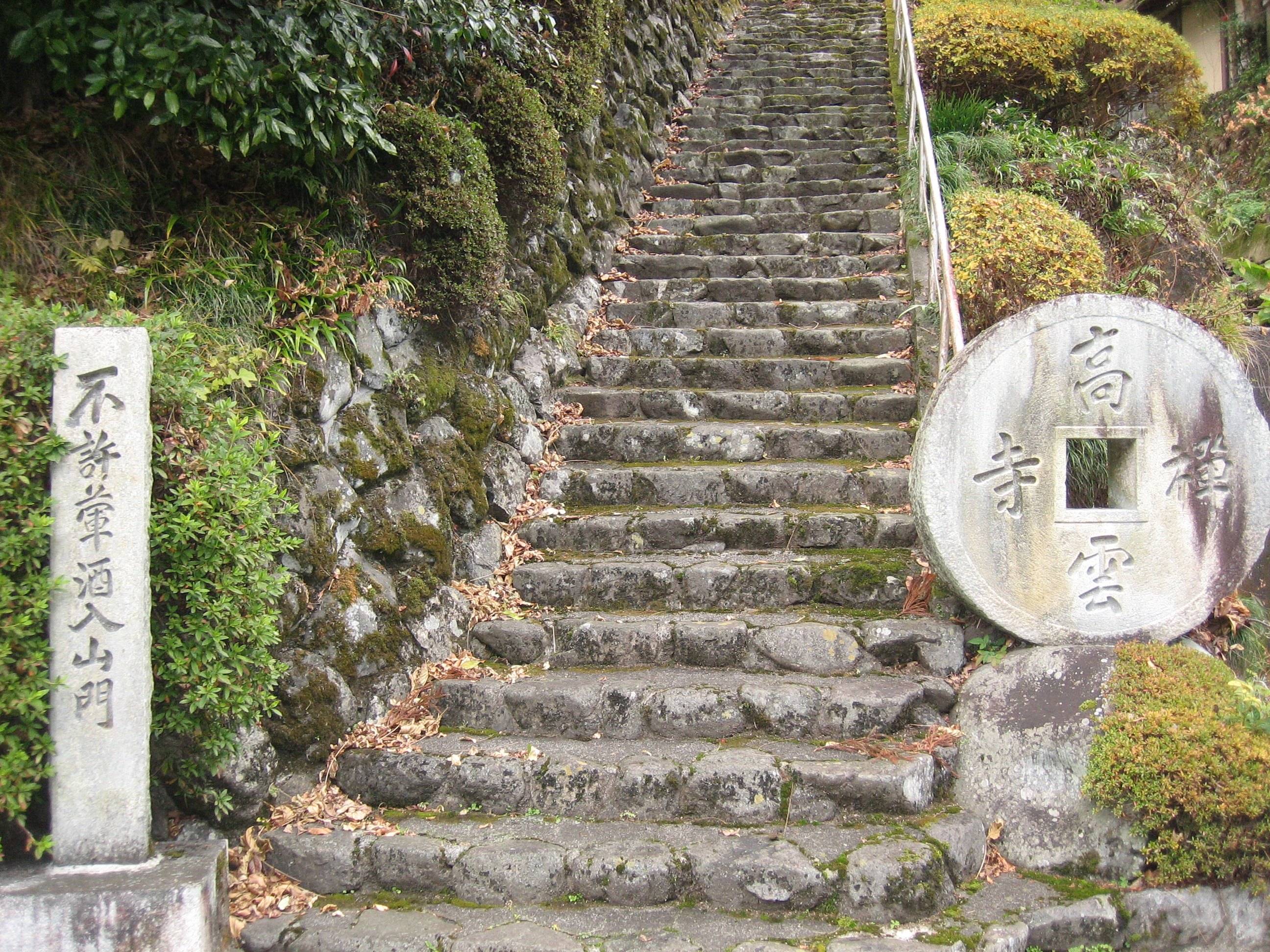 高雲寺門前を撮影